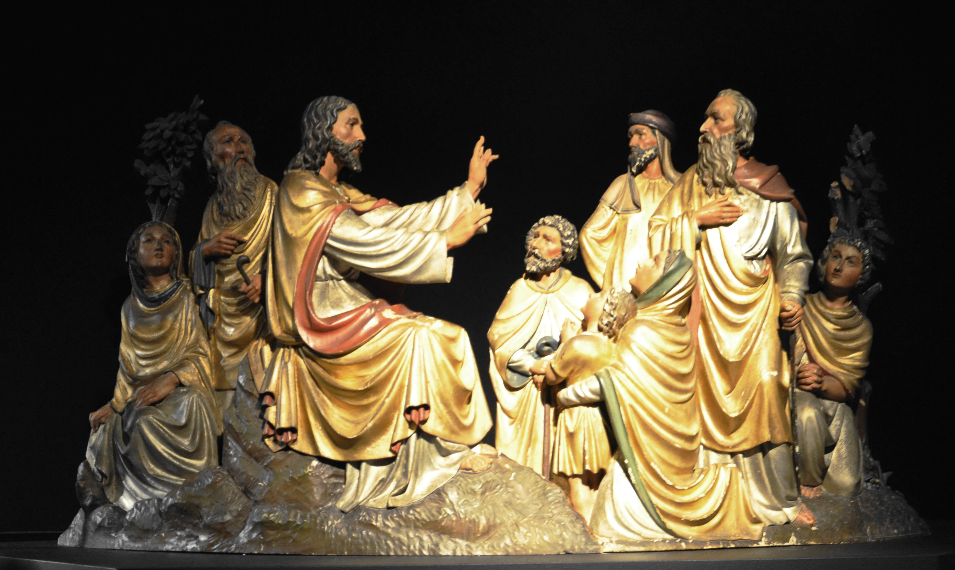 Relief "Bergpredigt" vom Kanzelkorb der ehemaligen Kanzel der Liebfrauenkirche Ravensburg, 1899; 1958 bis auf die Skulpturen zerstört (diese seither eingelagert); fotografiert in der Sonderausstellung Heilige Kunst aus dem Verborgenen im Museum Humpis-Quartier Ravensburg